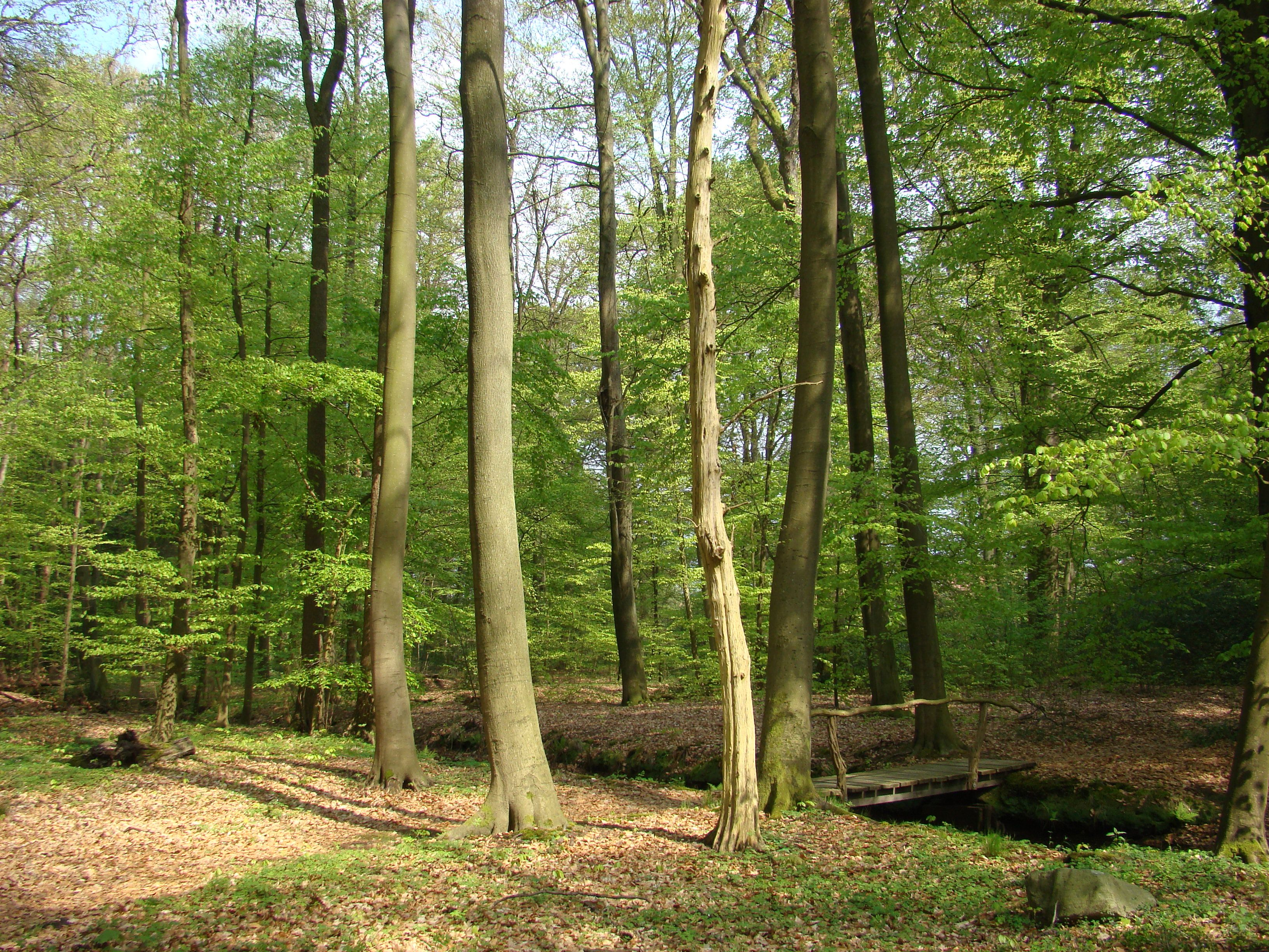 Ruheforst in Feuerschützenbostel, Niedersachsen, Germany